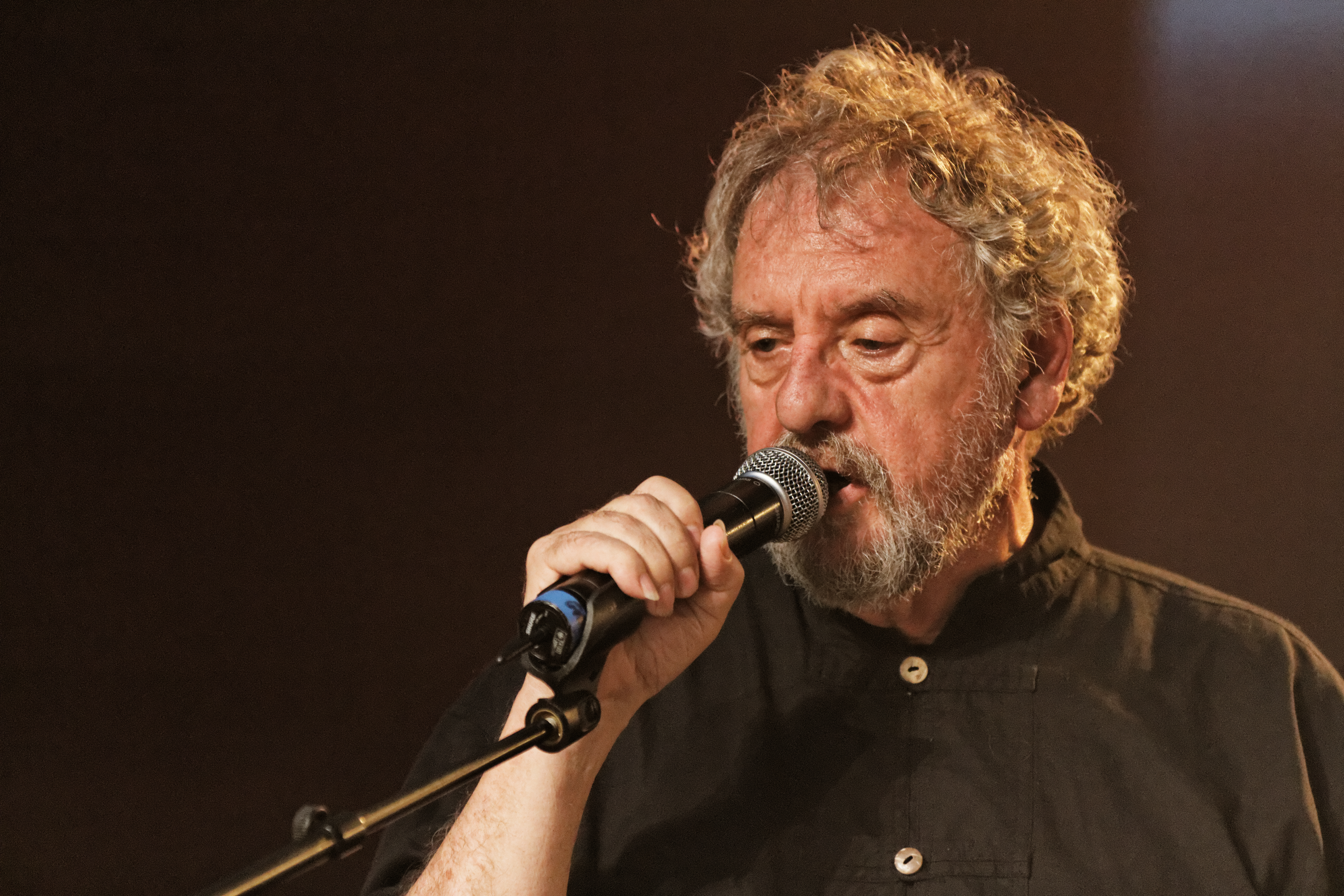 Dan ar Braz en concert sur la scène Gradlon lors du festival de Cornouaille 2013.